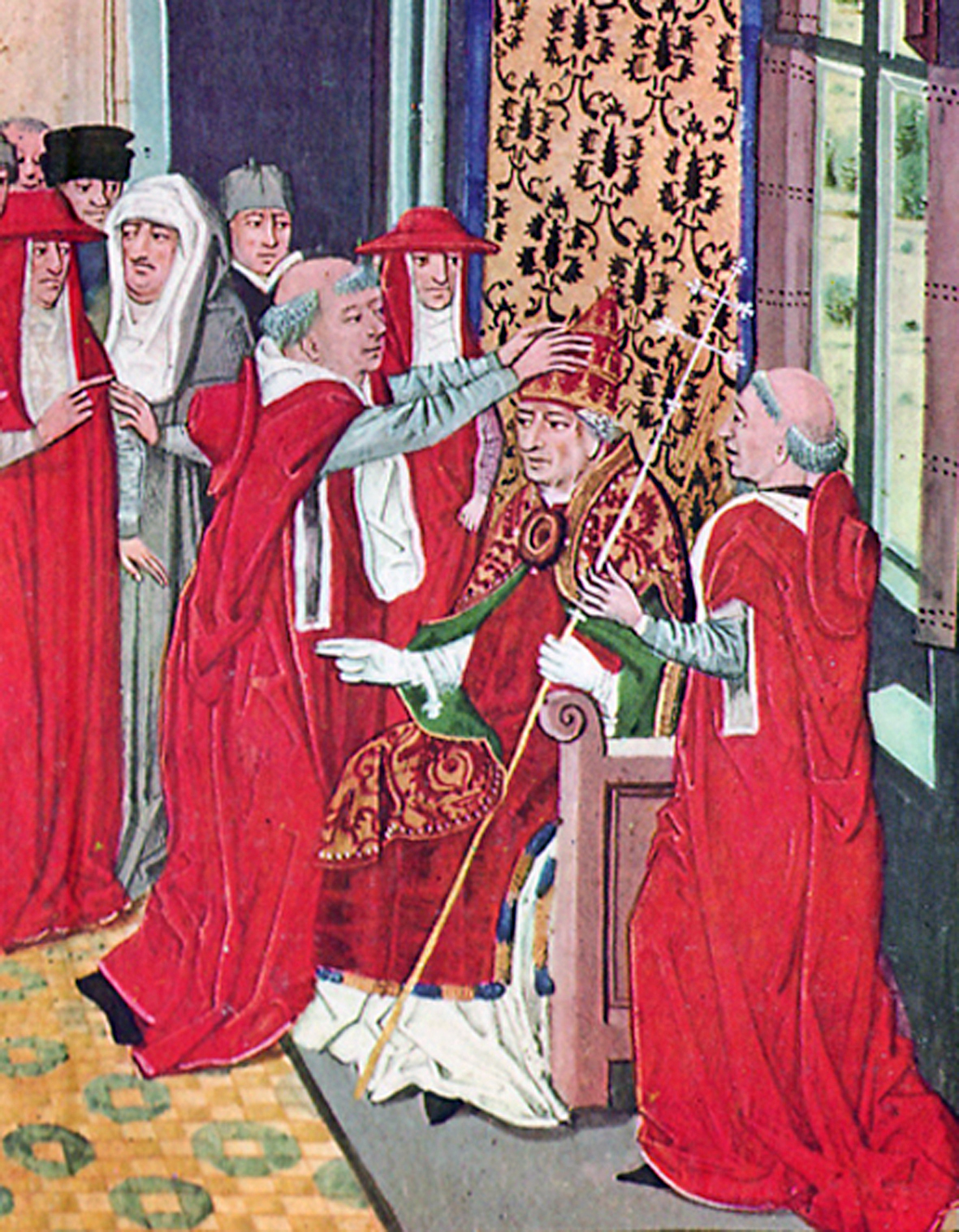 Grégoire XI couronné par Guy de Boulogne, archevêque de Lyon; Miniature des Chroniques de Froissart (XV°).